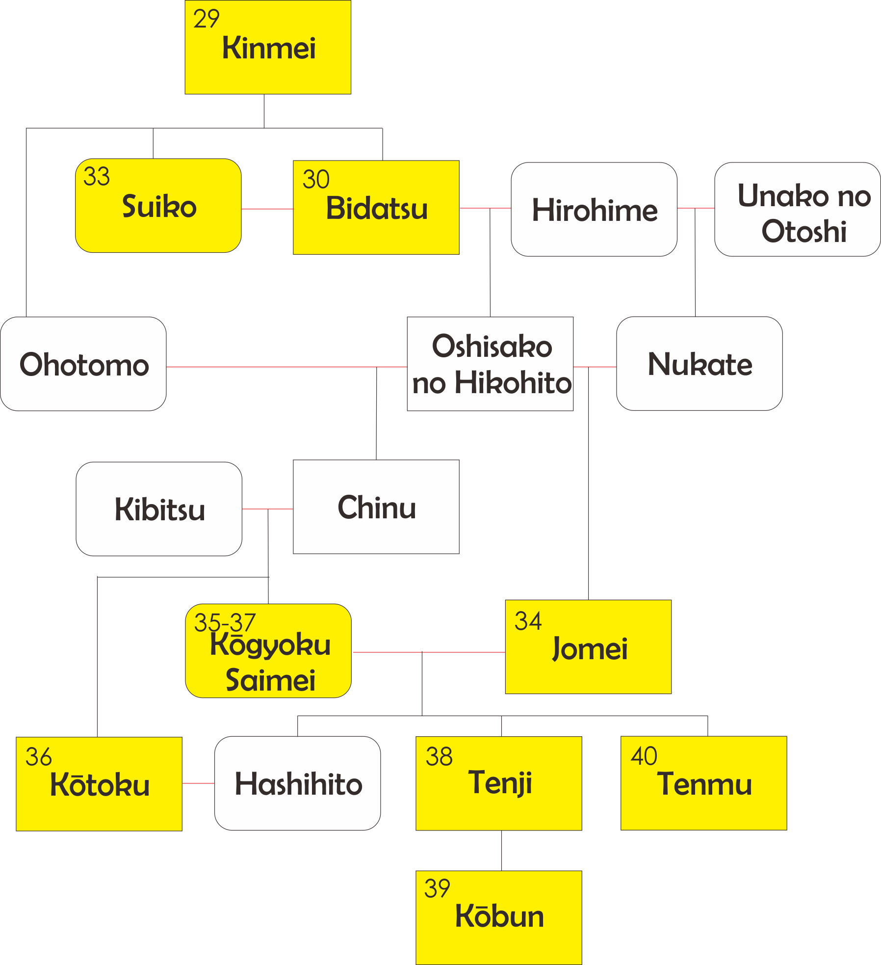 Silsilah Kaisarina Kōgyoku / Saimei